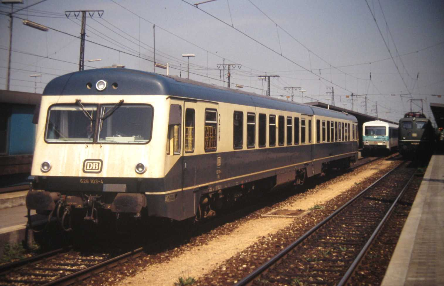 DB 628 103 in Augsburg Hbf; Archiv Nr 102/04